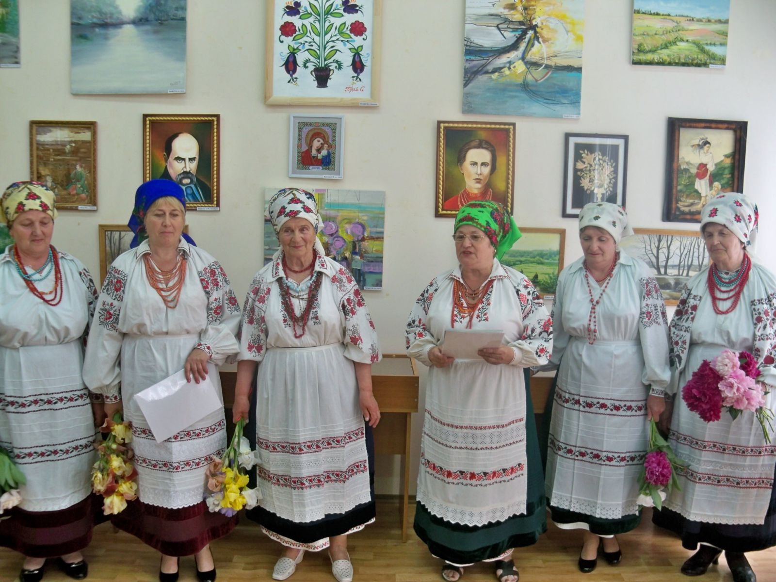 Оратівський районний краєзнавчий музей відзначив 25-літній ювілей